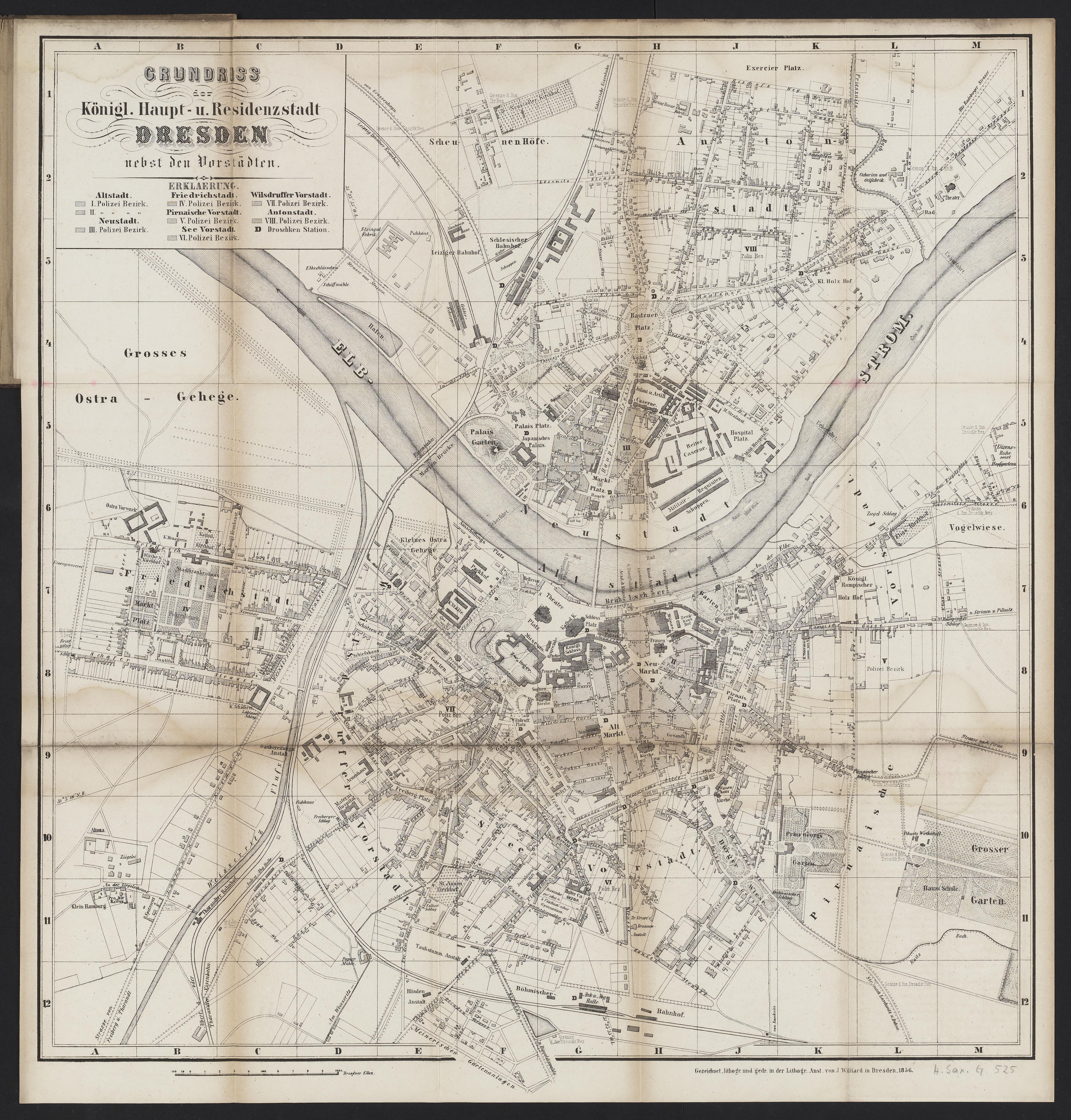 Grundriß der Königl. Haupt- u. Residenzstadt Dresden